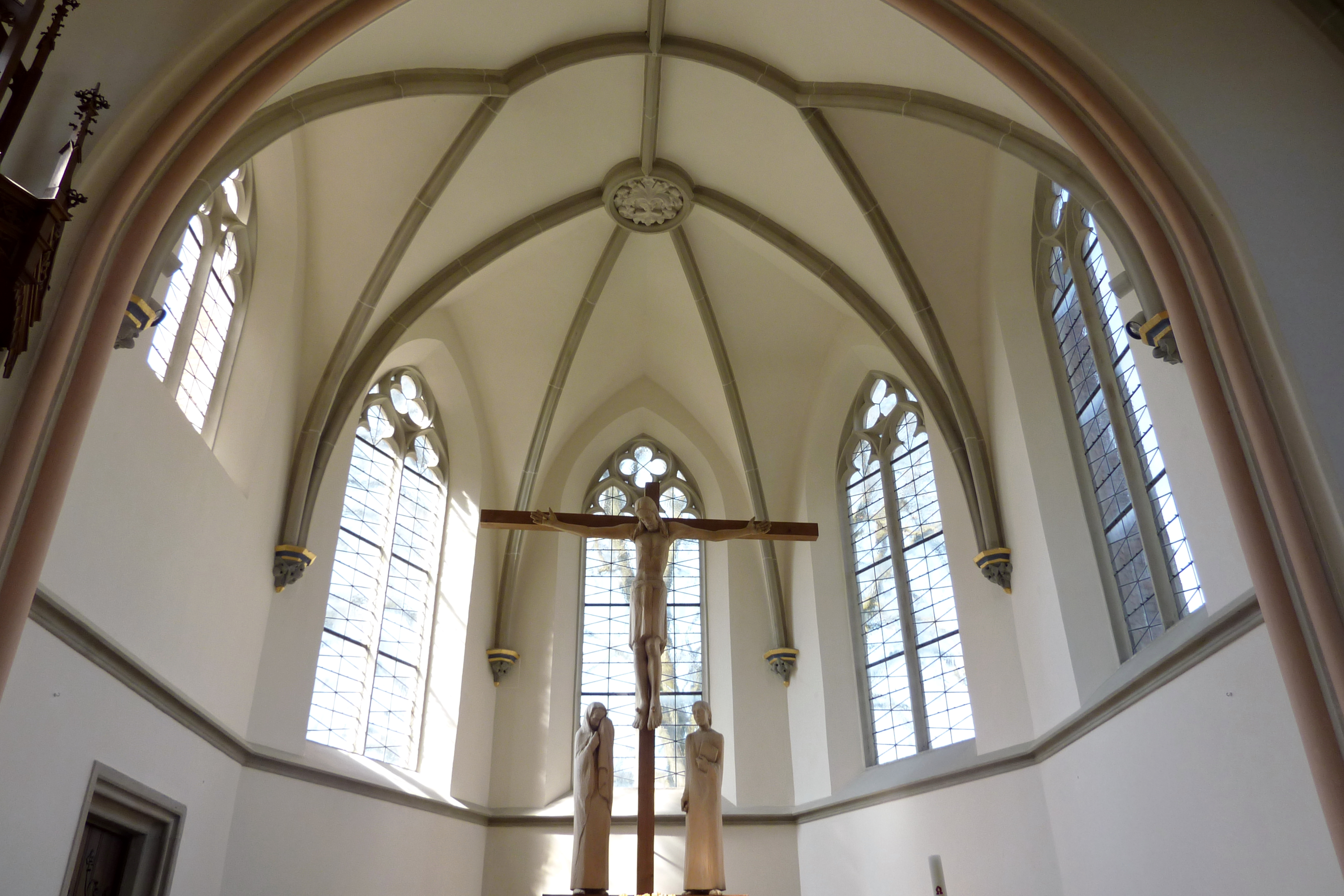 Evangelisch-Lutherische Katharinenkirche in Dillingen an der Dona, Chor mit Kreuzigungsgruppe